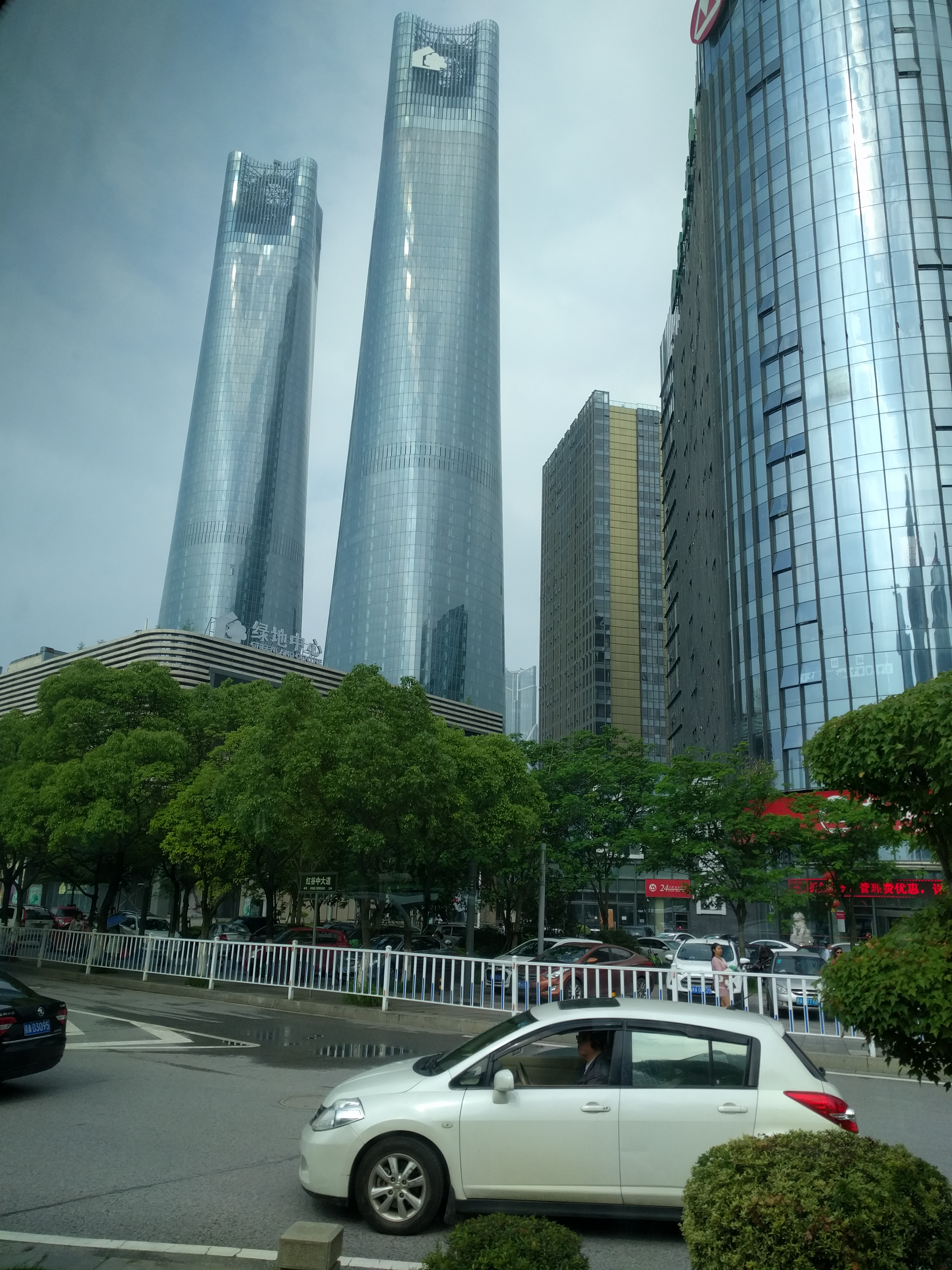 绿地双子塔